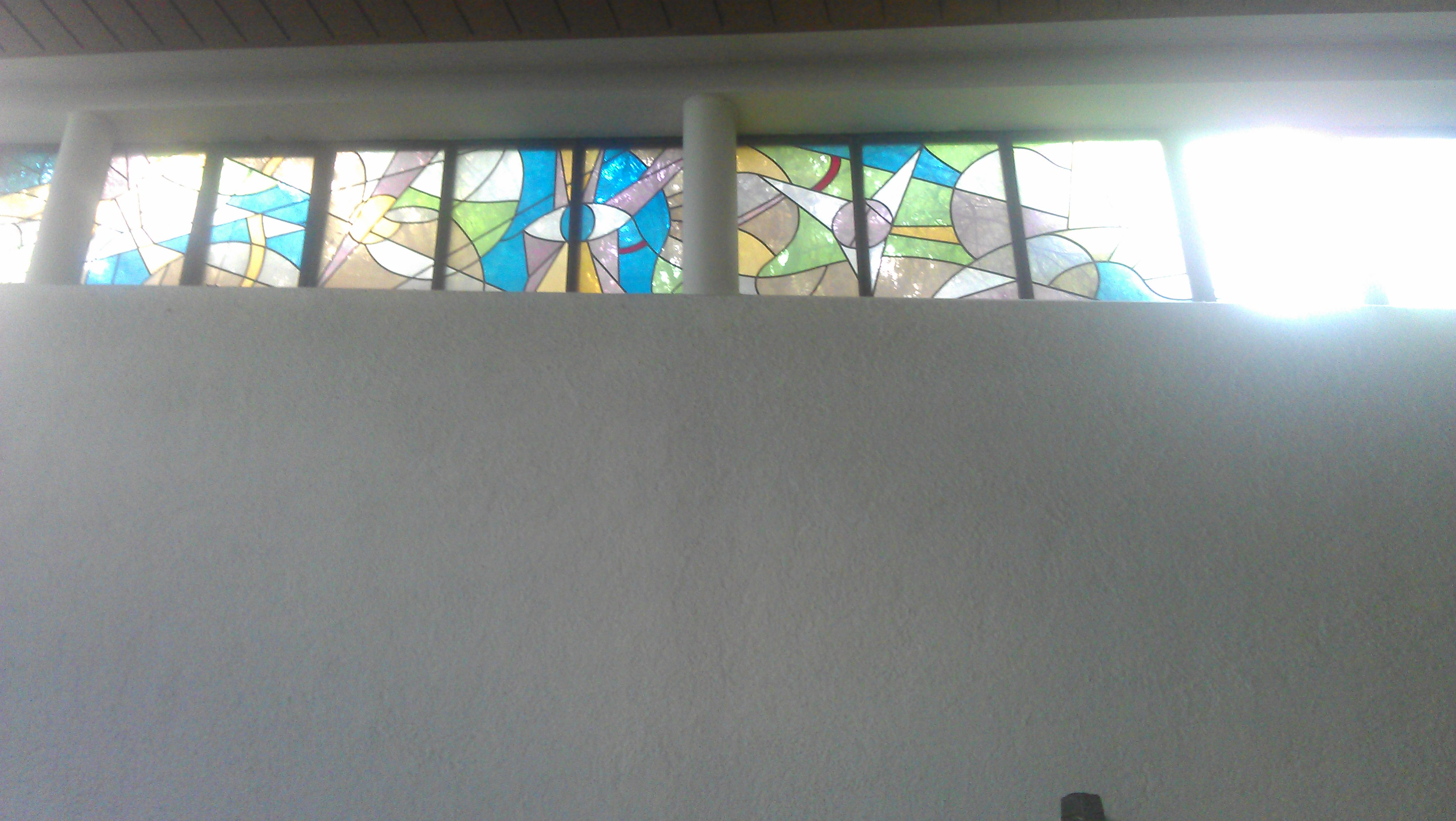 Glasfenster von W. Pauli, Kempten